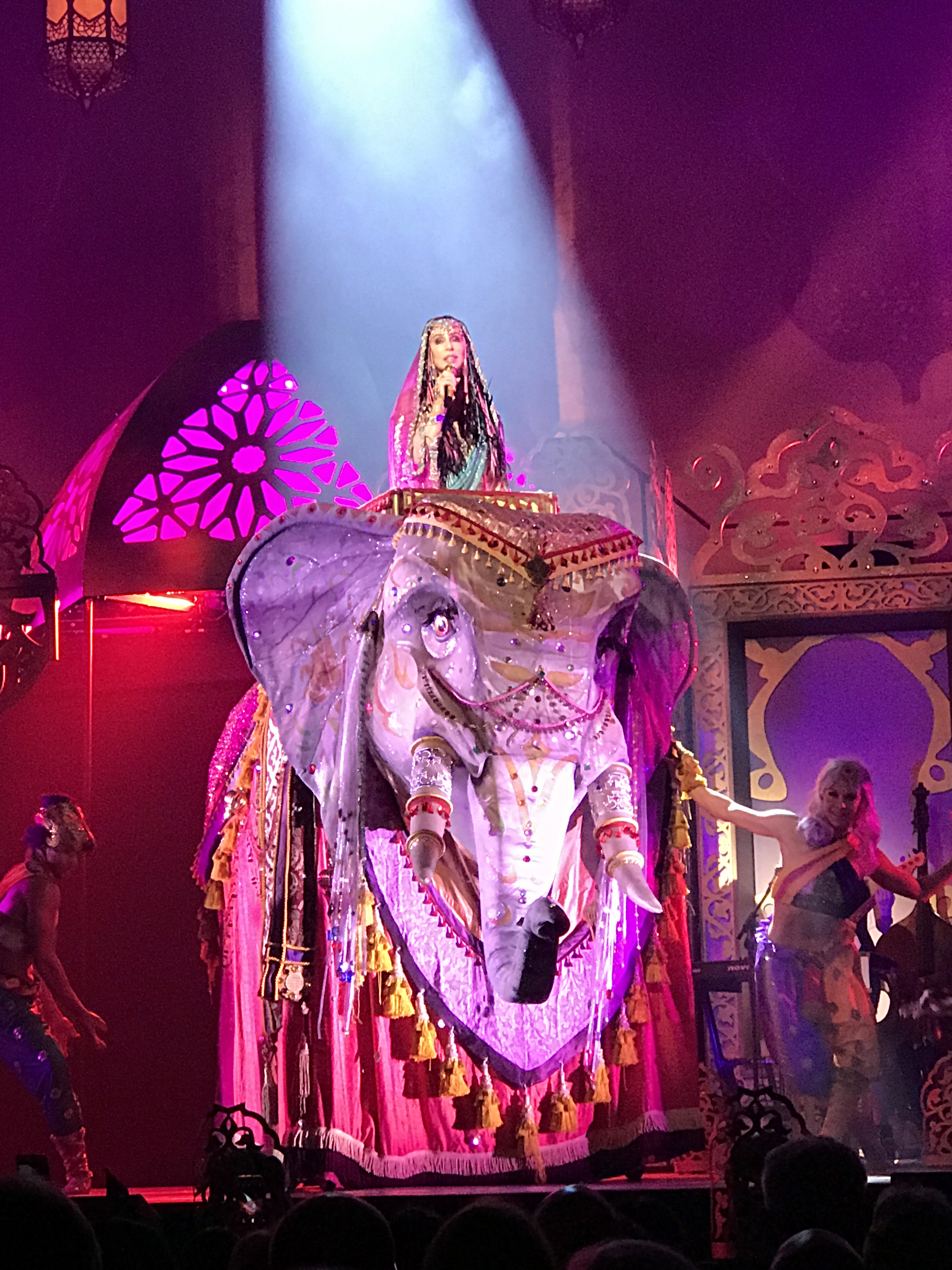 Cher cantando en el show Classic Cher.